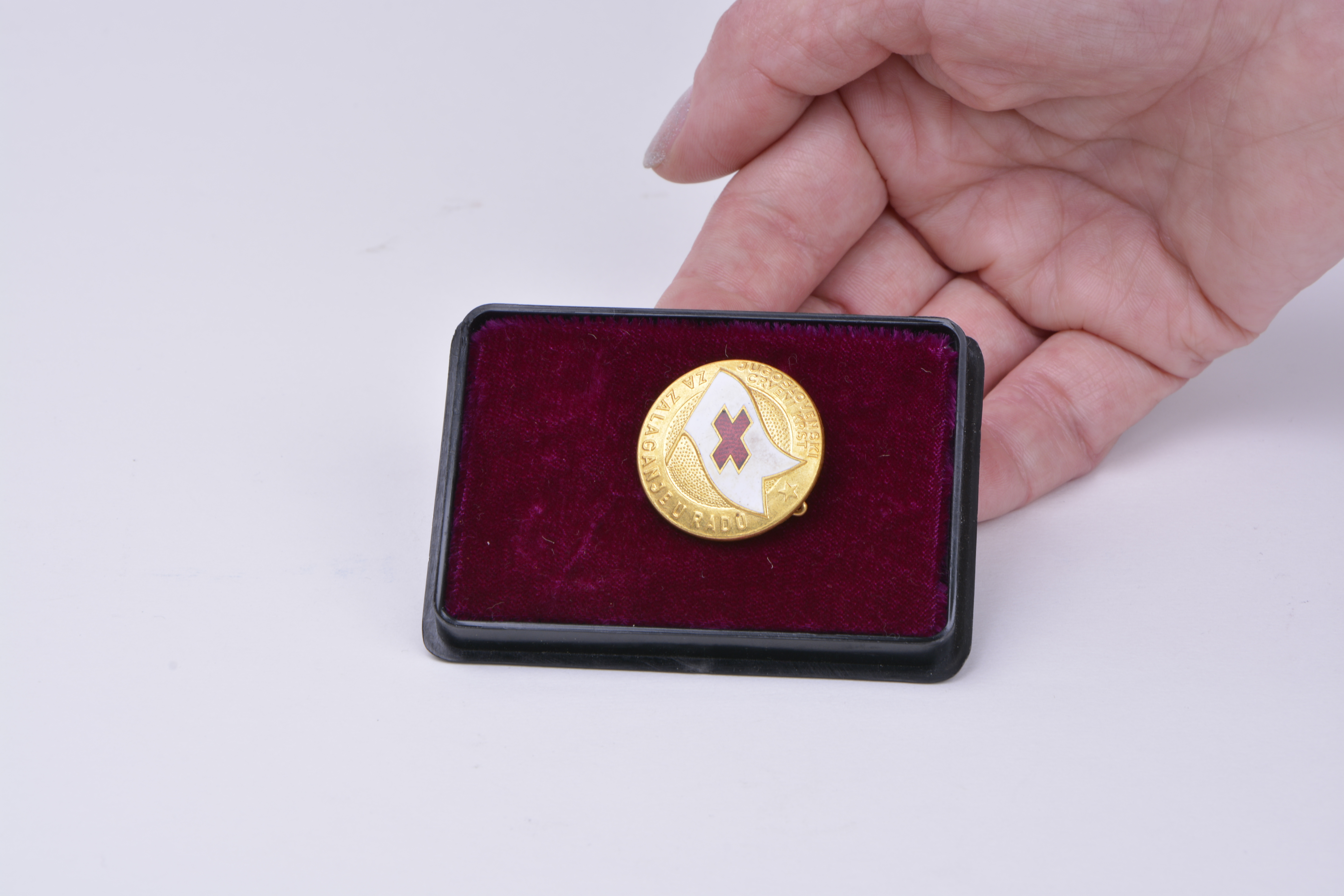 Srpski (latinica): Zlatna značka Crvenog krsta